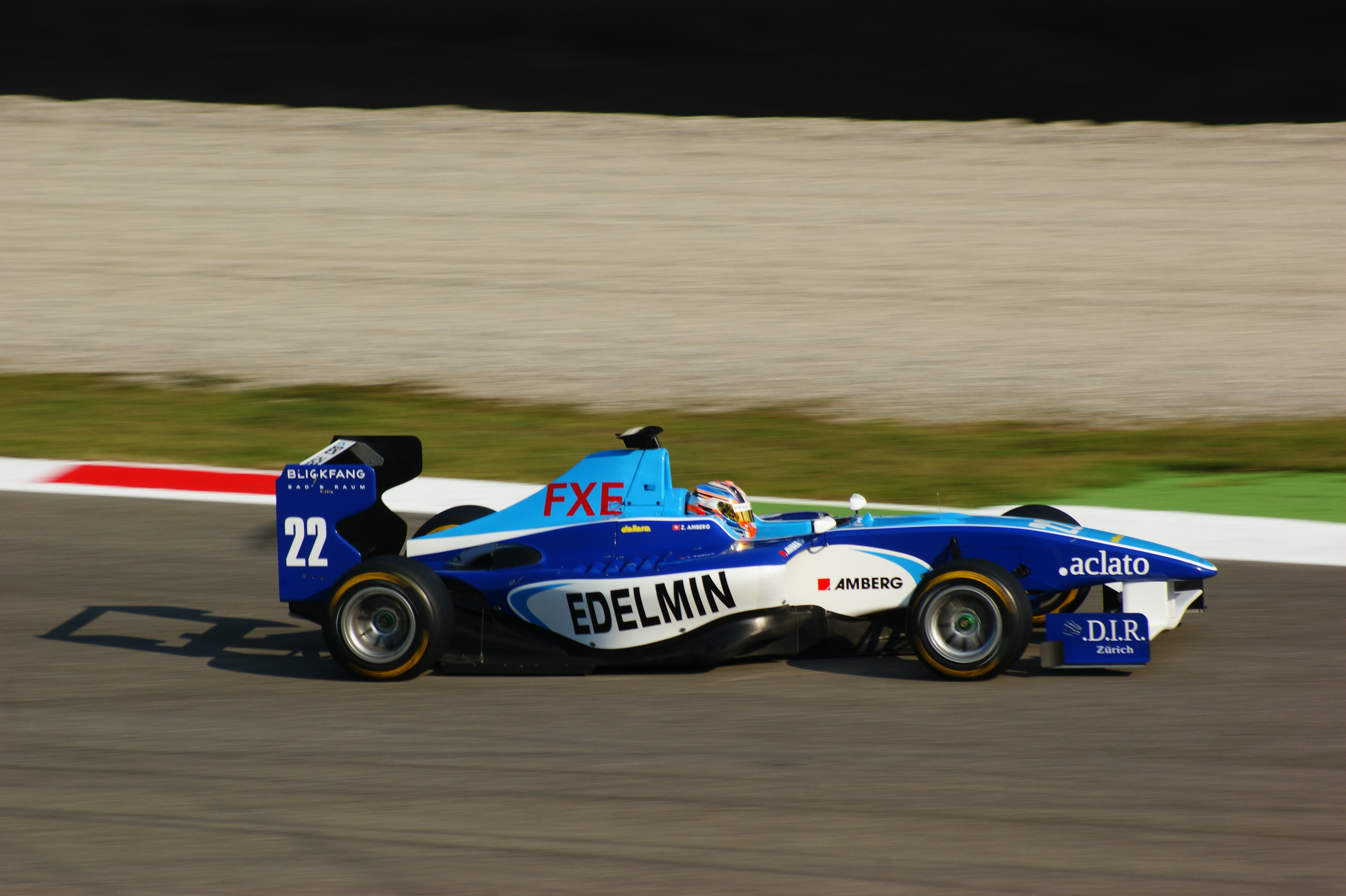 Zoël Amberg alla variante Ascari Monza 2011